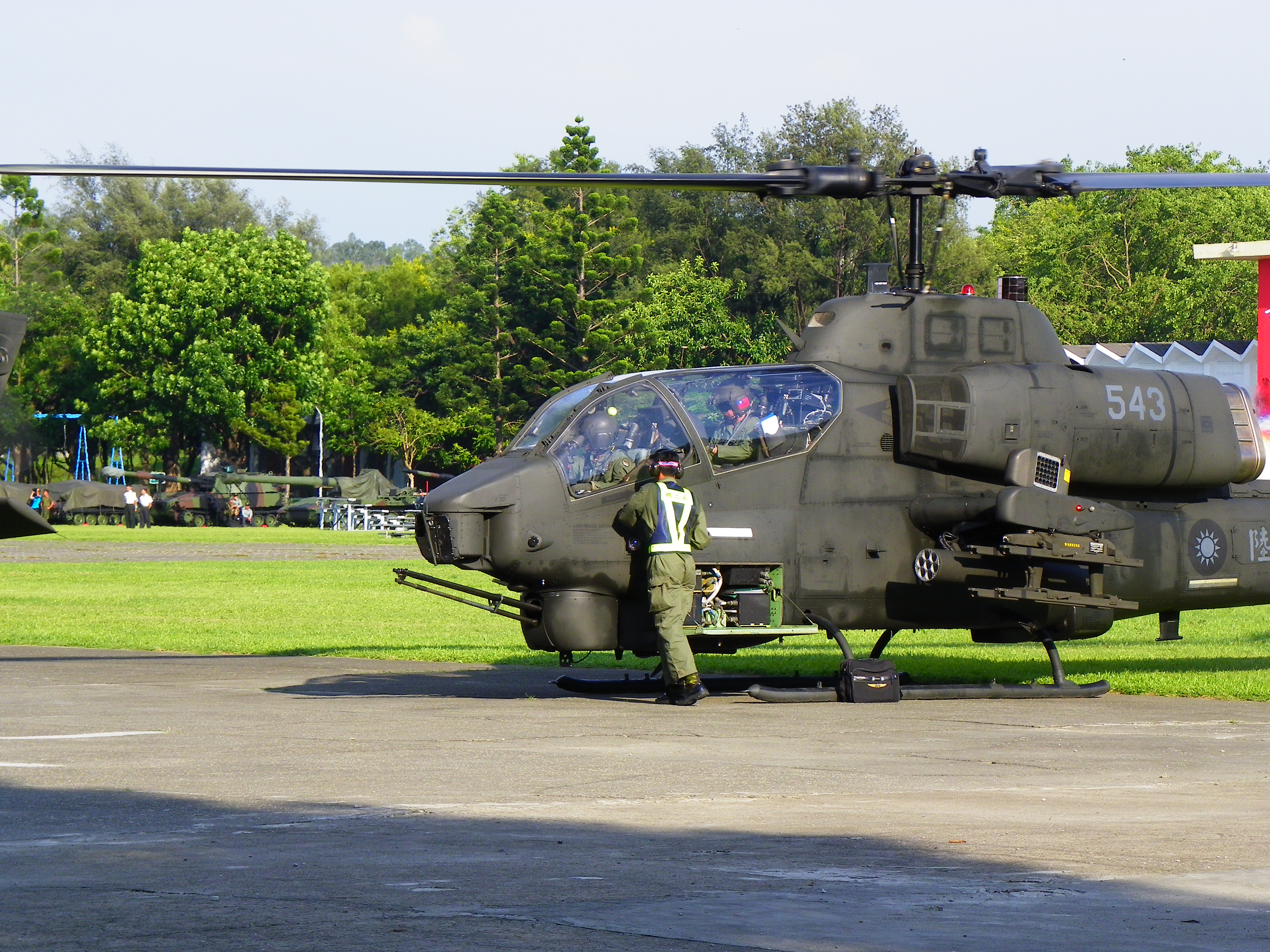 陸航AH-1W 543起飛前暖機中，地勤人員與駕駛艙中的飛行員溝通。